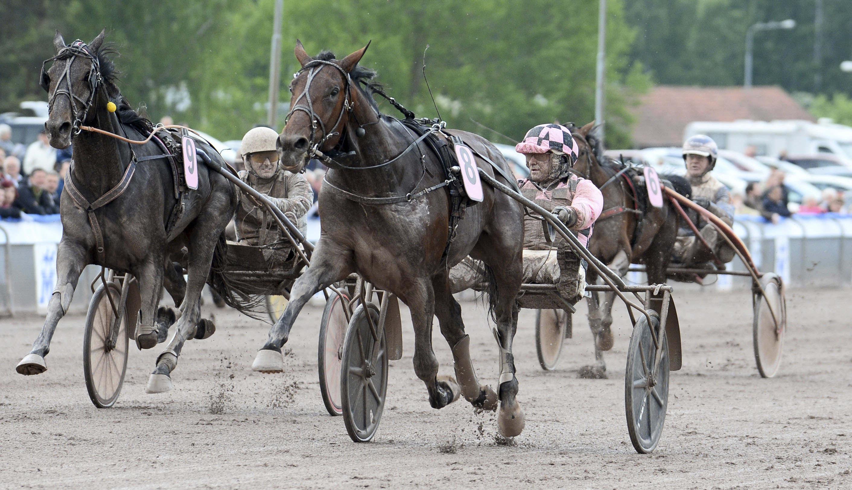 Foto: Malin Albinsson/Kanal 75 Mantorp 20170603 Muscle Hustle och Robert Bergh i Ins Scots ära